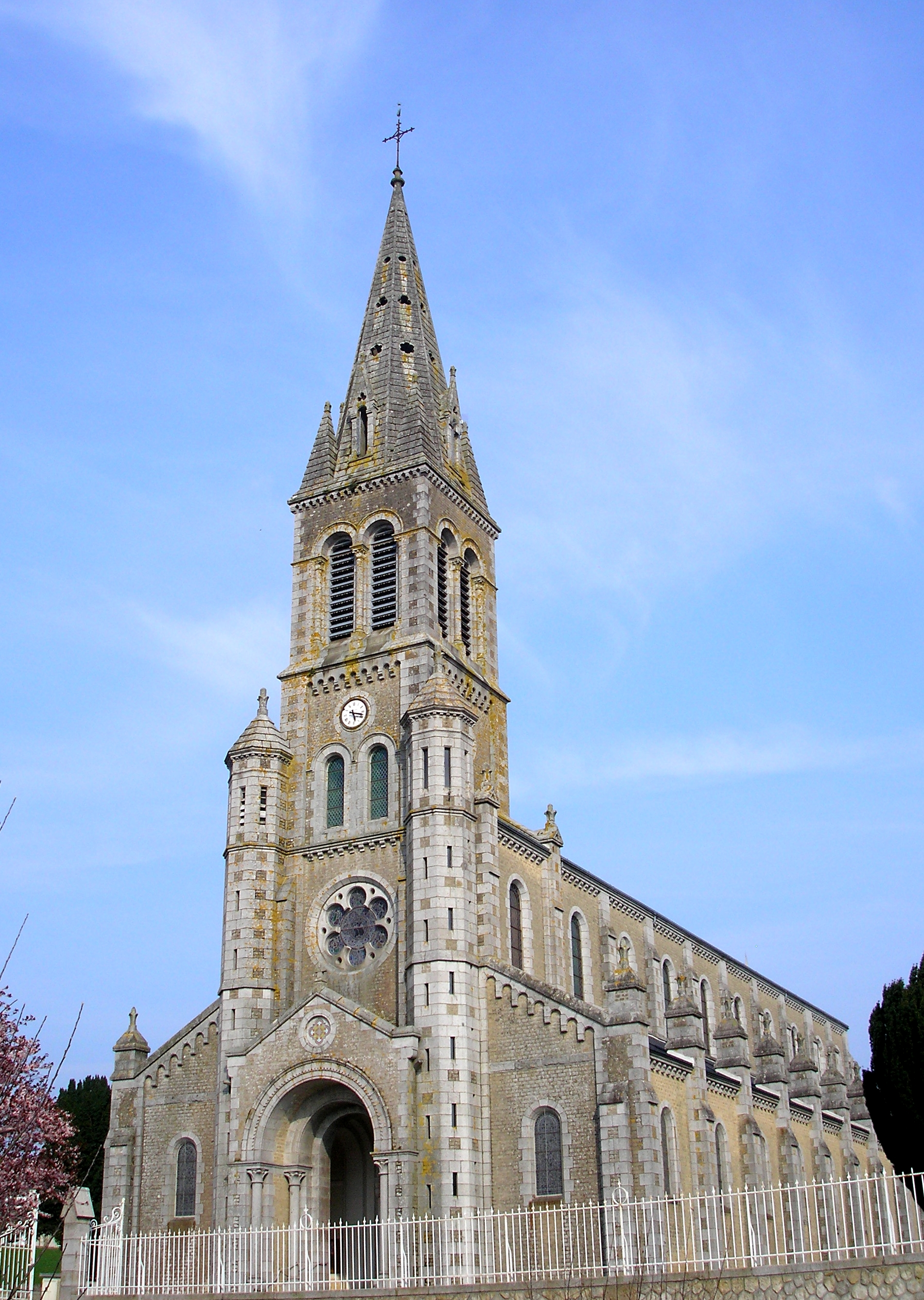 Barenton (Normandie, France). L'église.